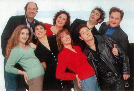 I protagonisti del programma Avanzi. Sullo sfondo: Stefano Masciarelli, [???] , Pier Francesco Loche, Antonello Fassari In primo piano: Francesca Reggiani, Serena Dandini, Valentina Amurri, Corrado Guzzanti